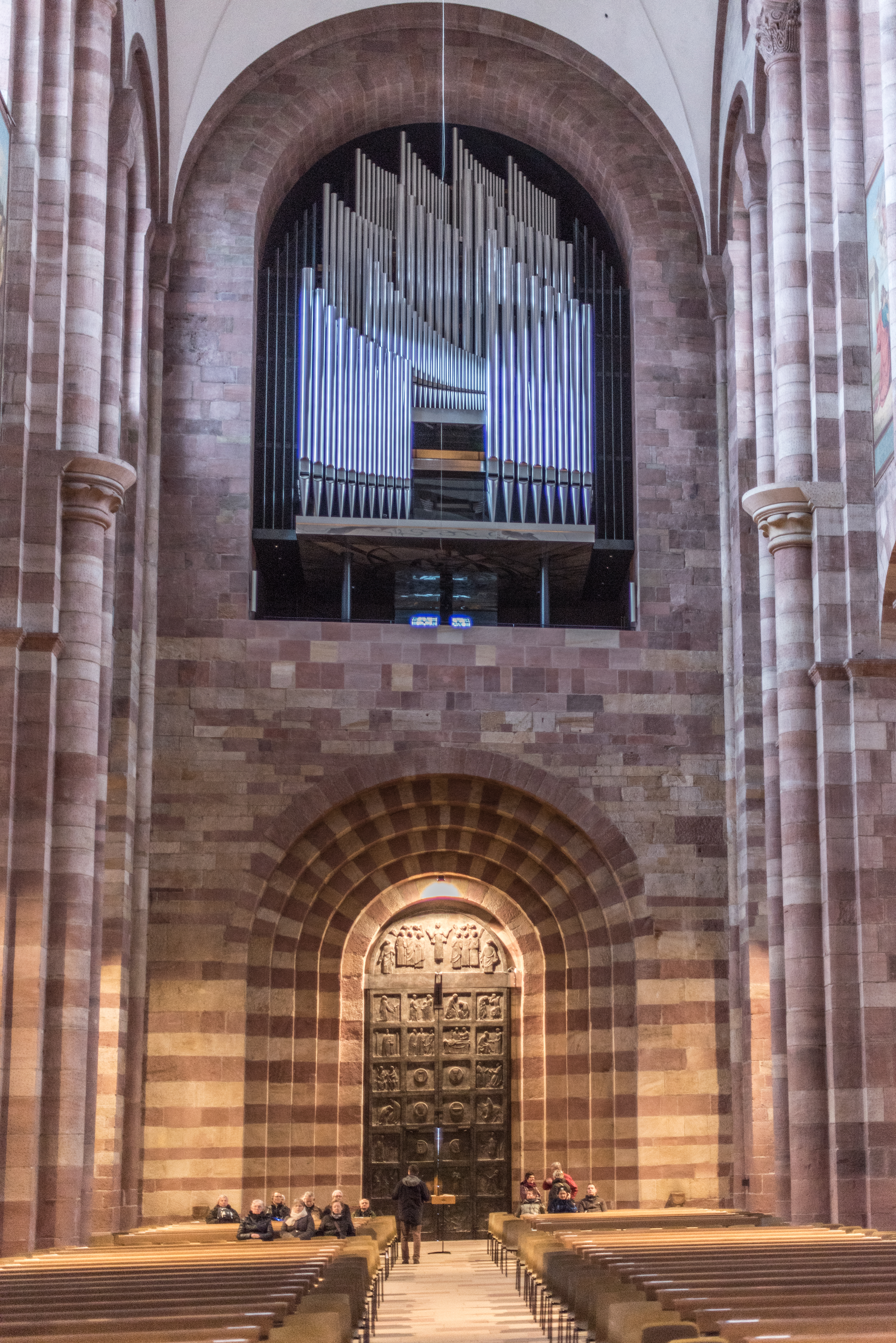 Speyer, Domkirche St. Maria und St. Stephan